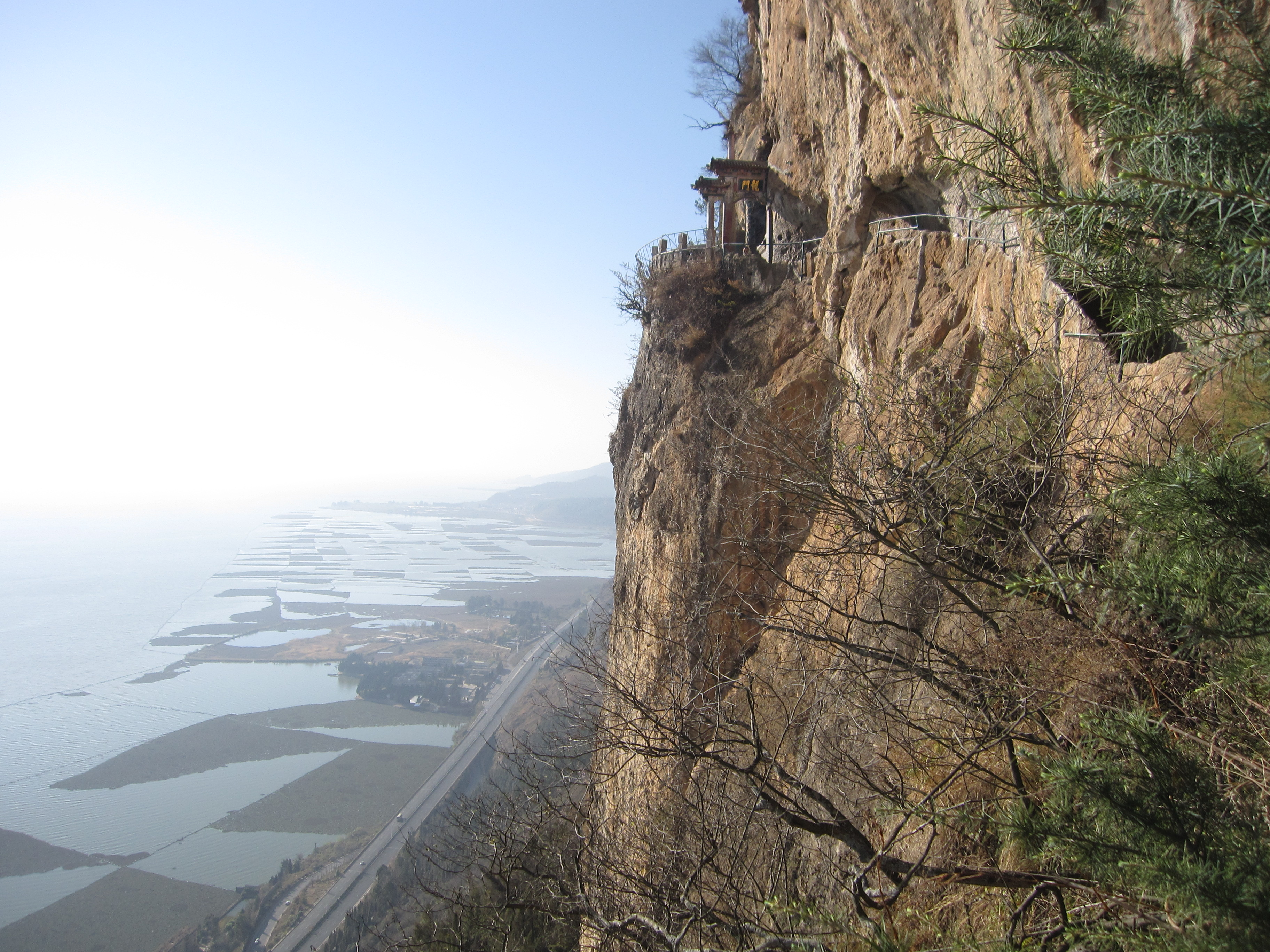 Long Môn